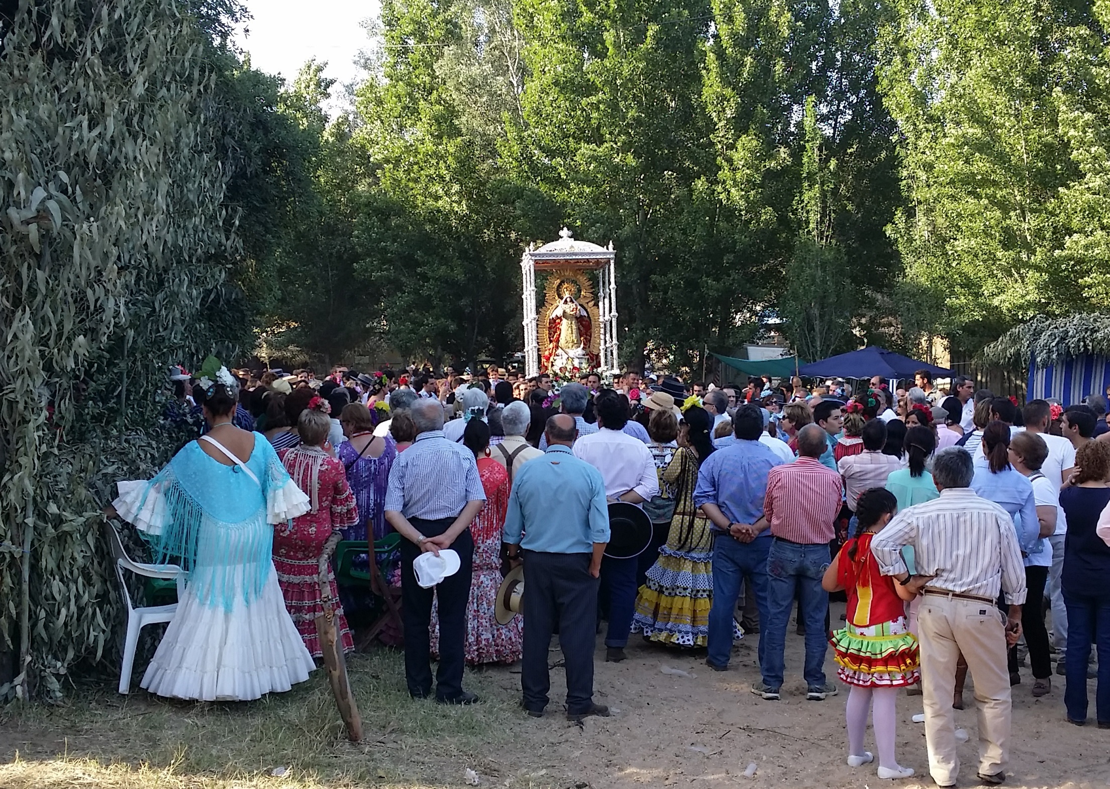 Romeria de Montemayor (Moguer - España)